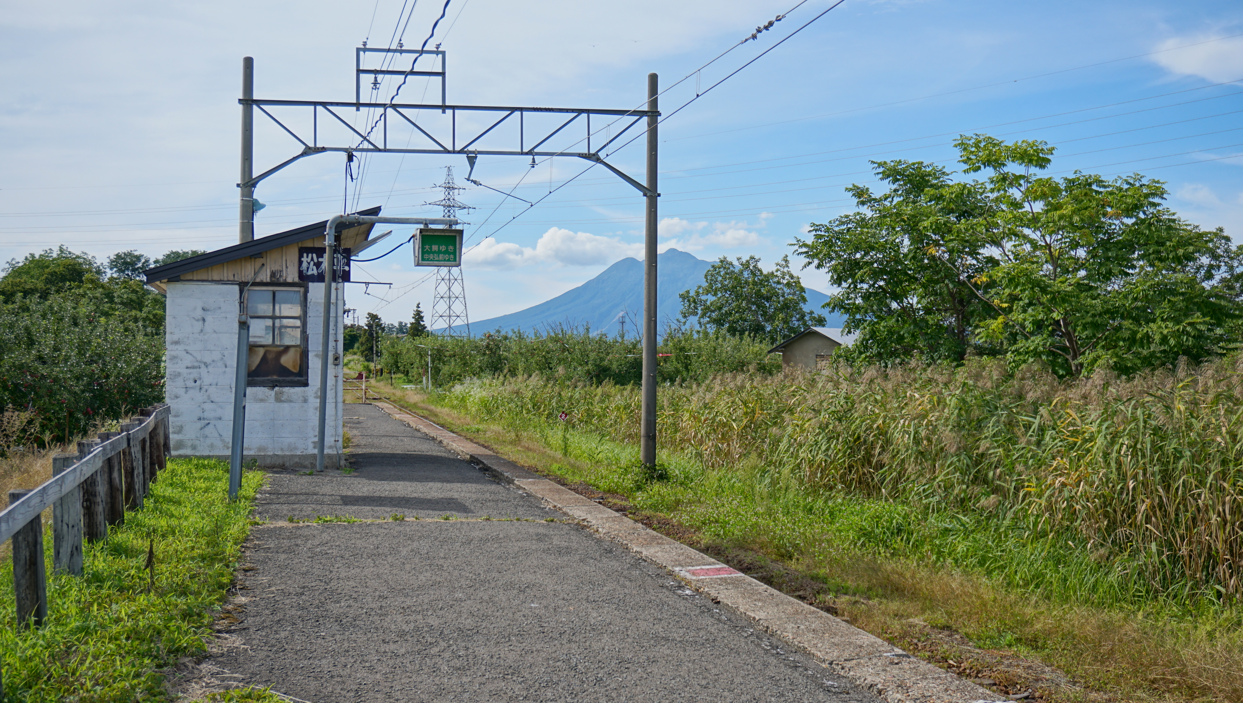 弘南鉄道大鰐線 松木平駅